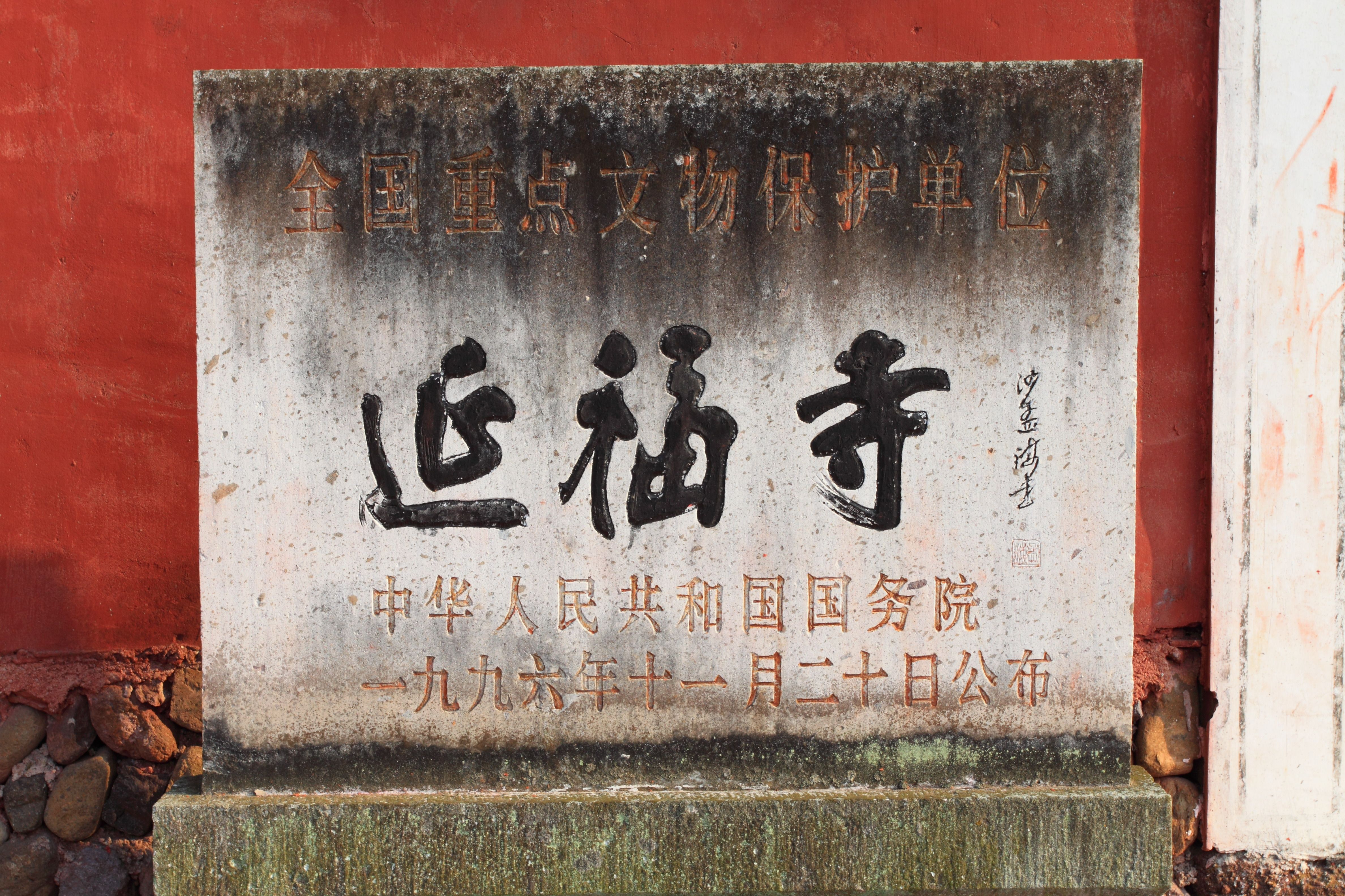 延福寺，位于中国浙江省武义县，是全国重点文物保护单位。